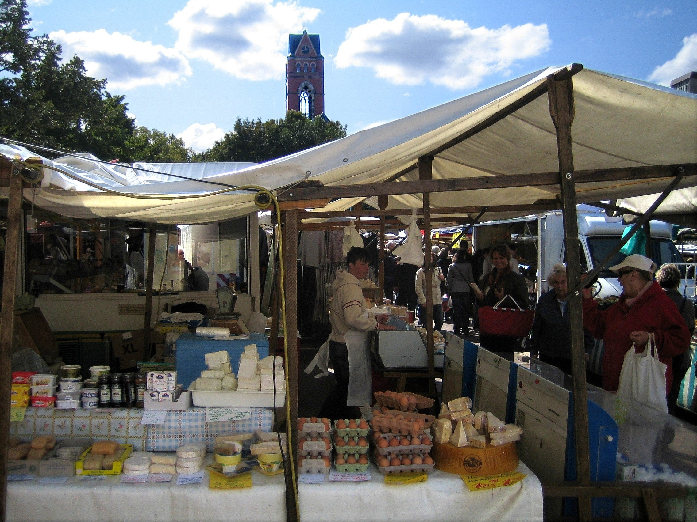 Berlin, Bezirk Schöneberg-Tempelhof, Winterfeldplatz. Marktszene.